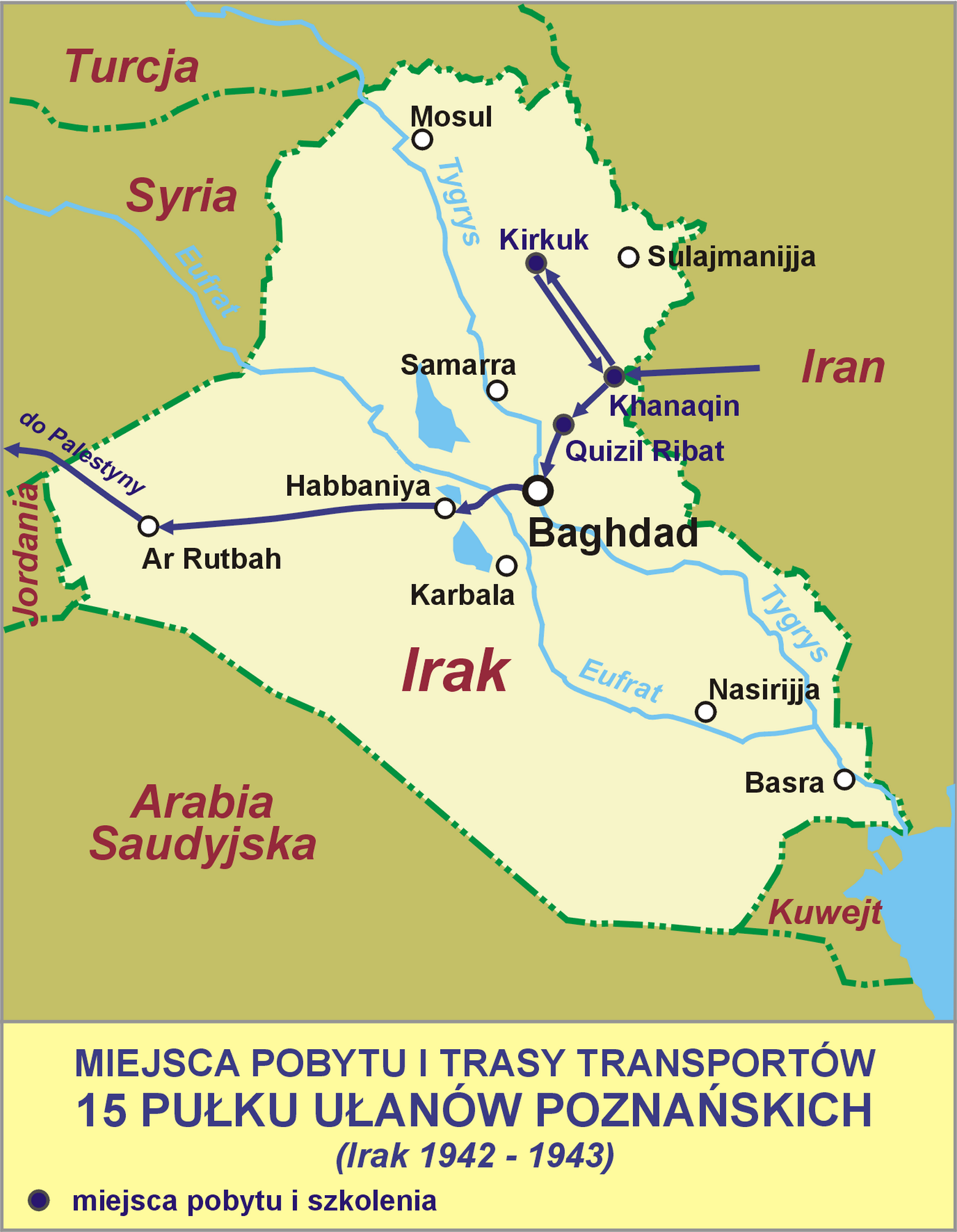 Miejsca pobytu i trasy transportów 15 Pułku Ułanów Poznańskich (Irak 1942 - 1943)